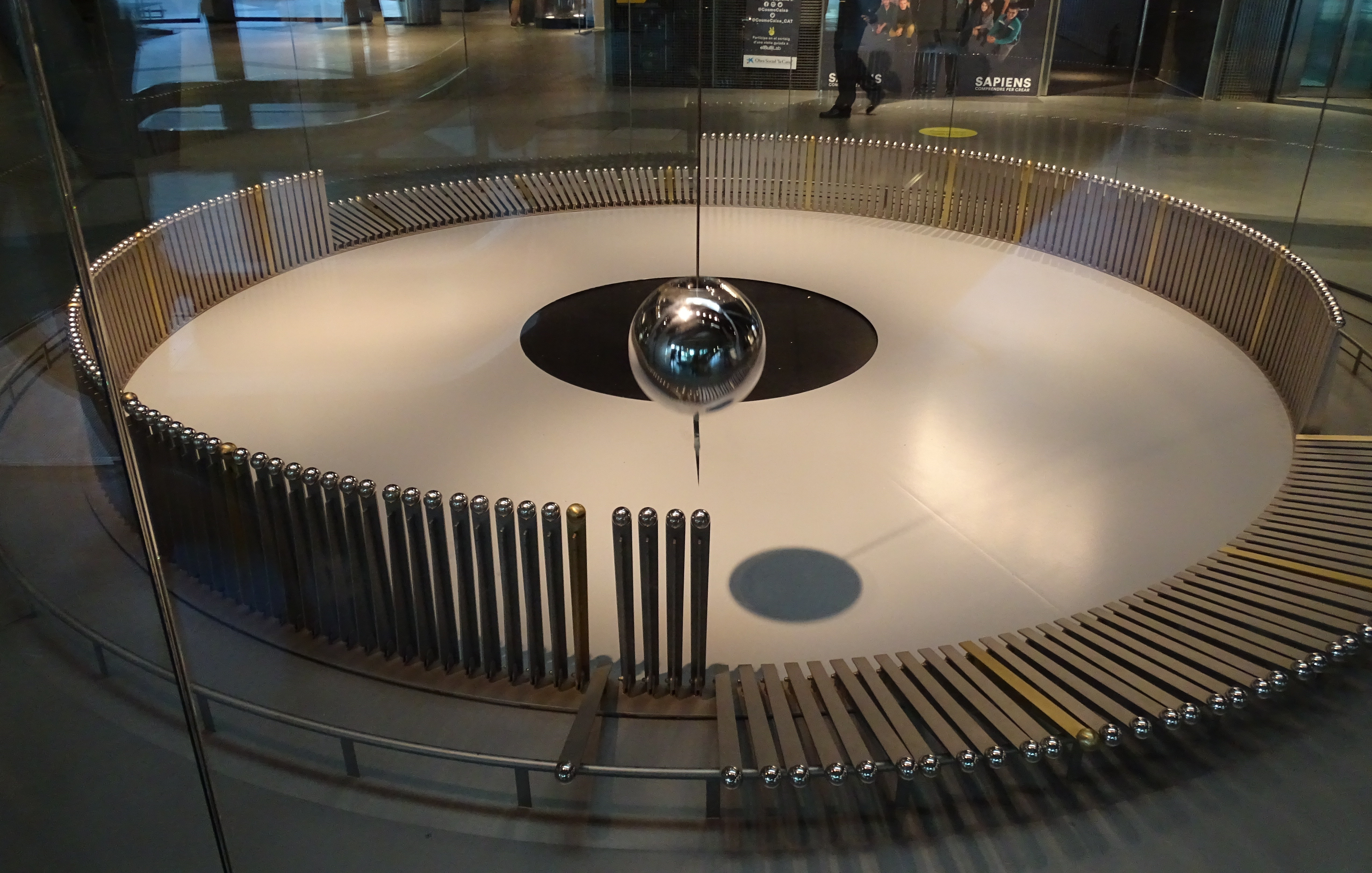 De slinger van Foucault in CosmoCaixa Barcelona.